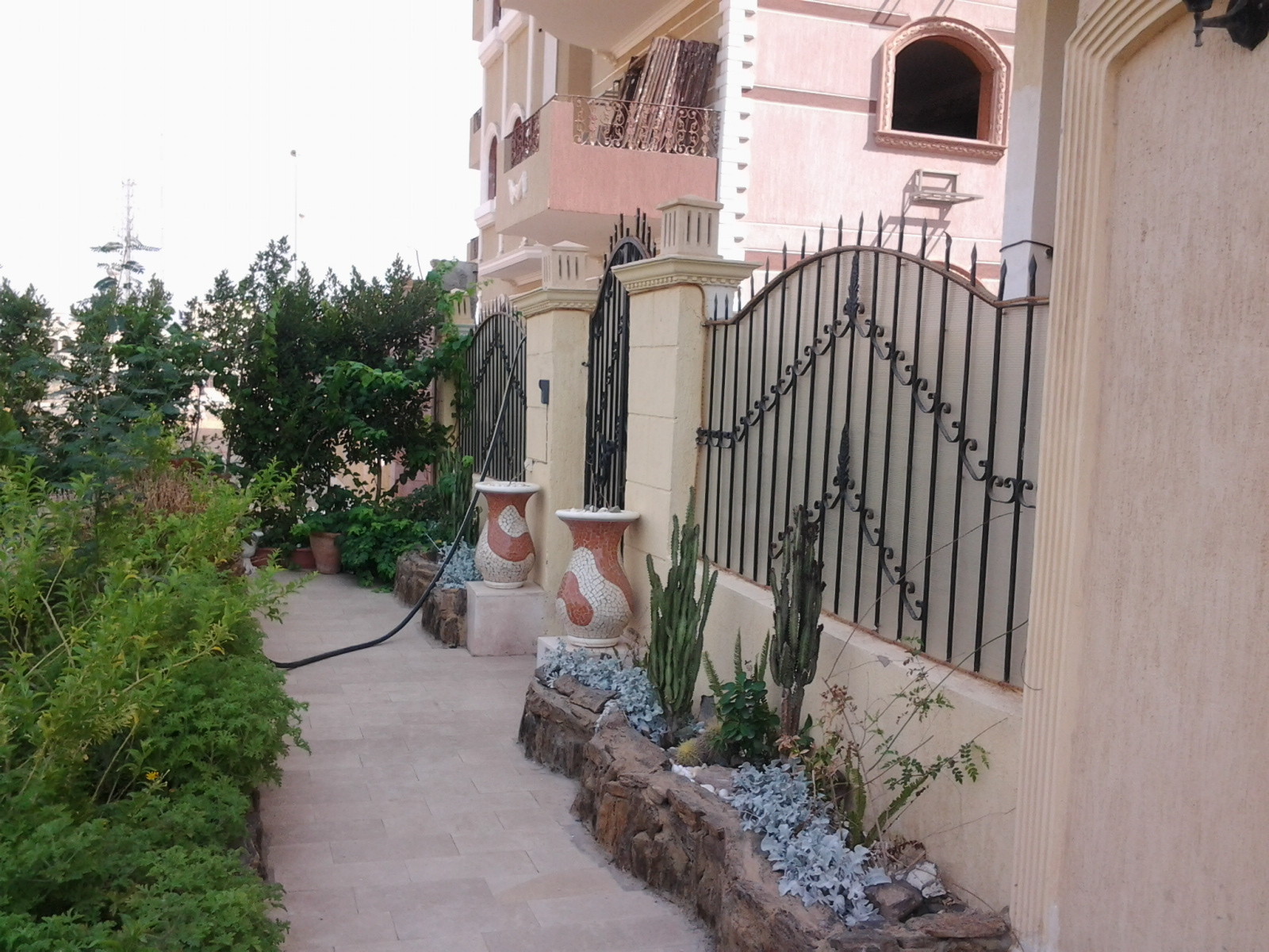 مدخل العمارة